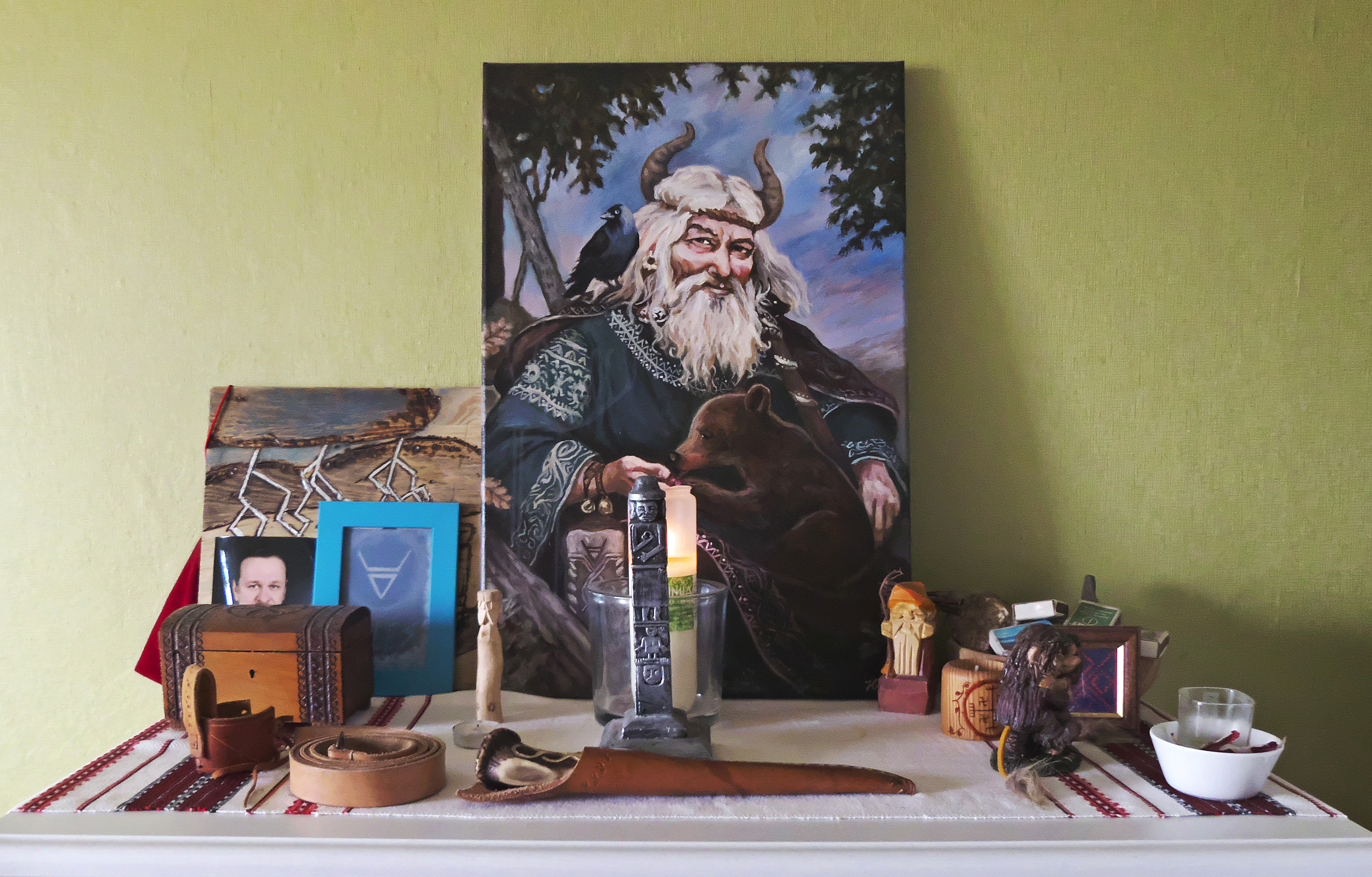 Ołtarzyk domowy z wizerunkiem Welesa.